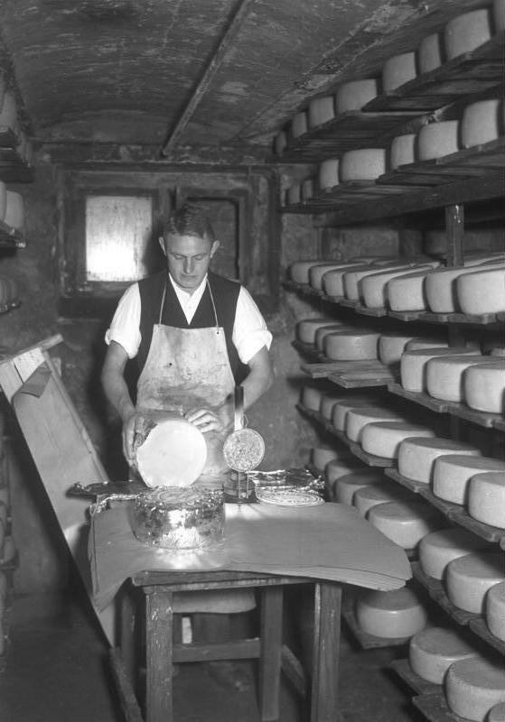 Tilsit (Ostpreussen) Zubereitung von Tisiter Käse und Versand [1930er Jahre]